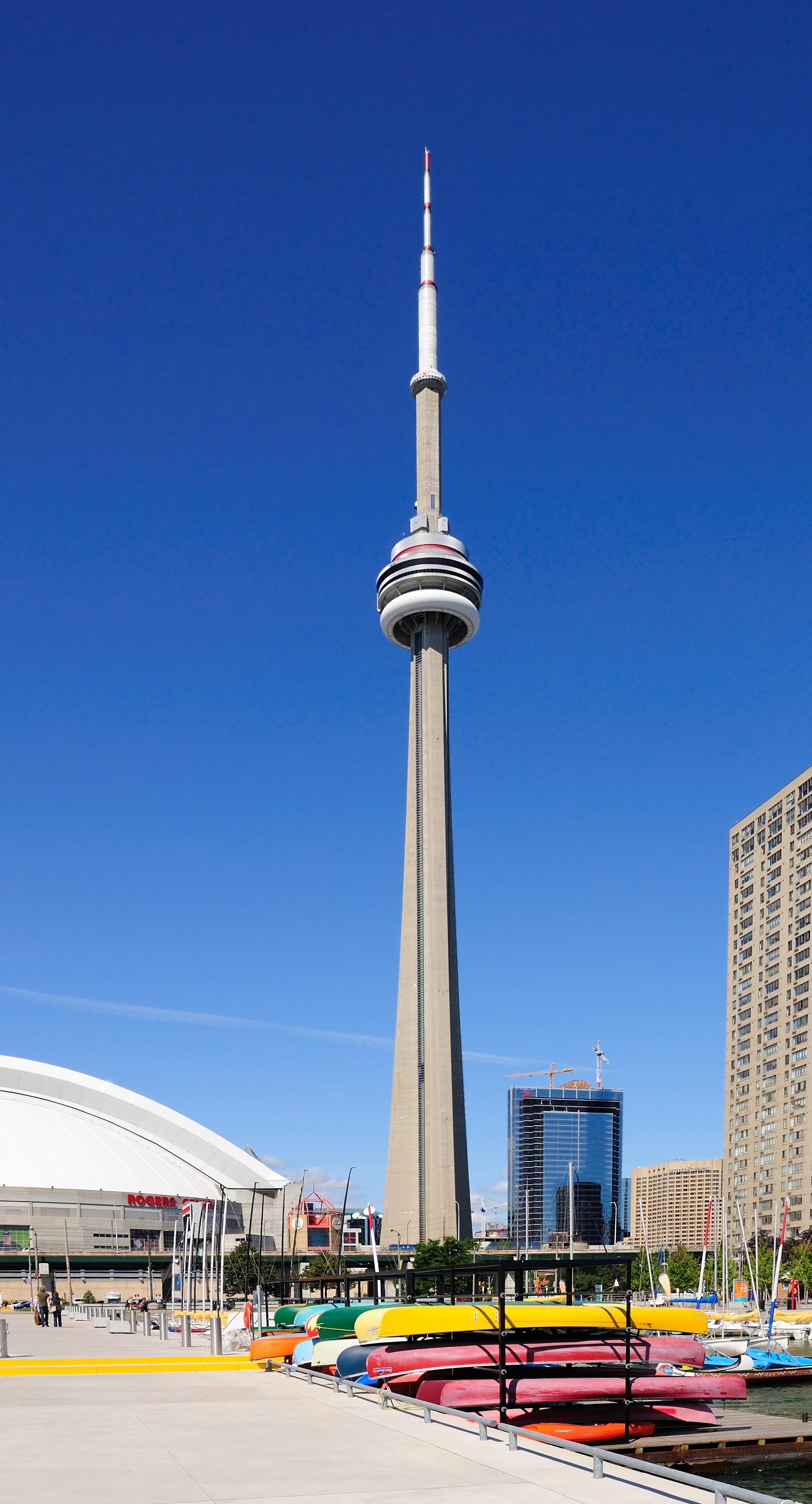 Toronto: CN Tower von der Harborfront aus gesehen